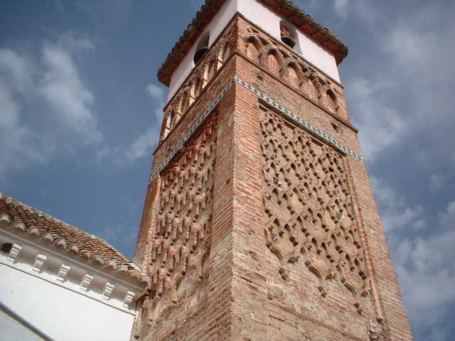 Torre alminar de Archez